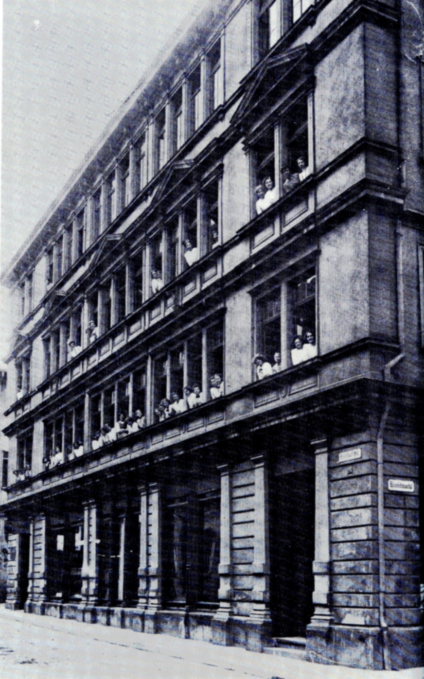 Frauenhaus